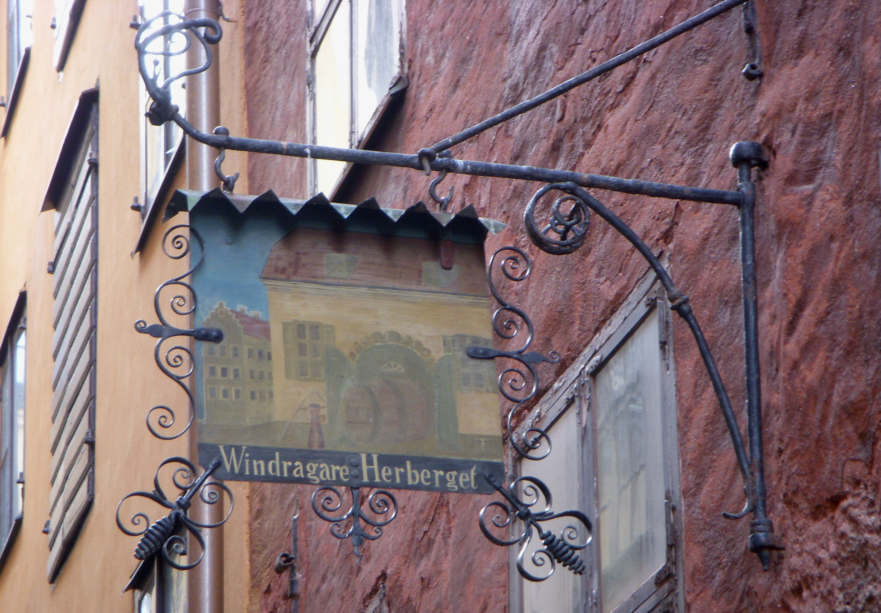 Vindragarlagets hus i Gamla stan, skylt